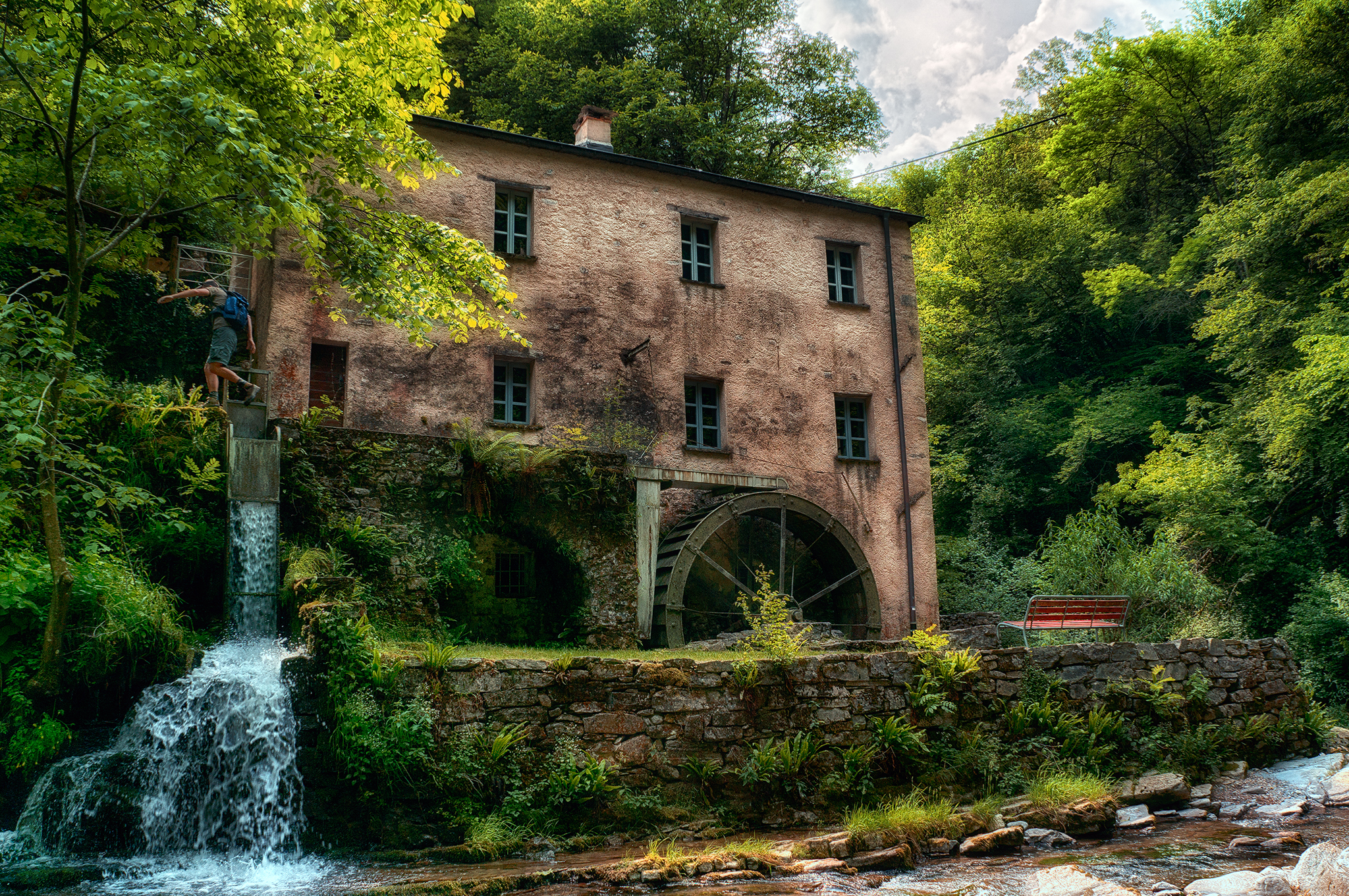 Mulino